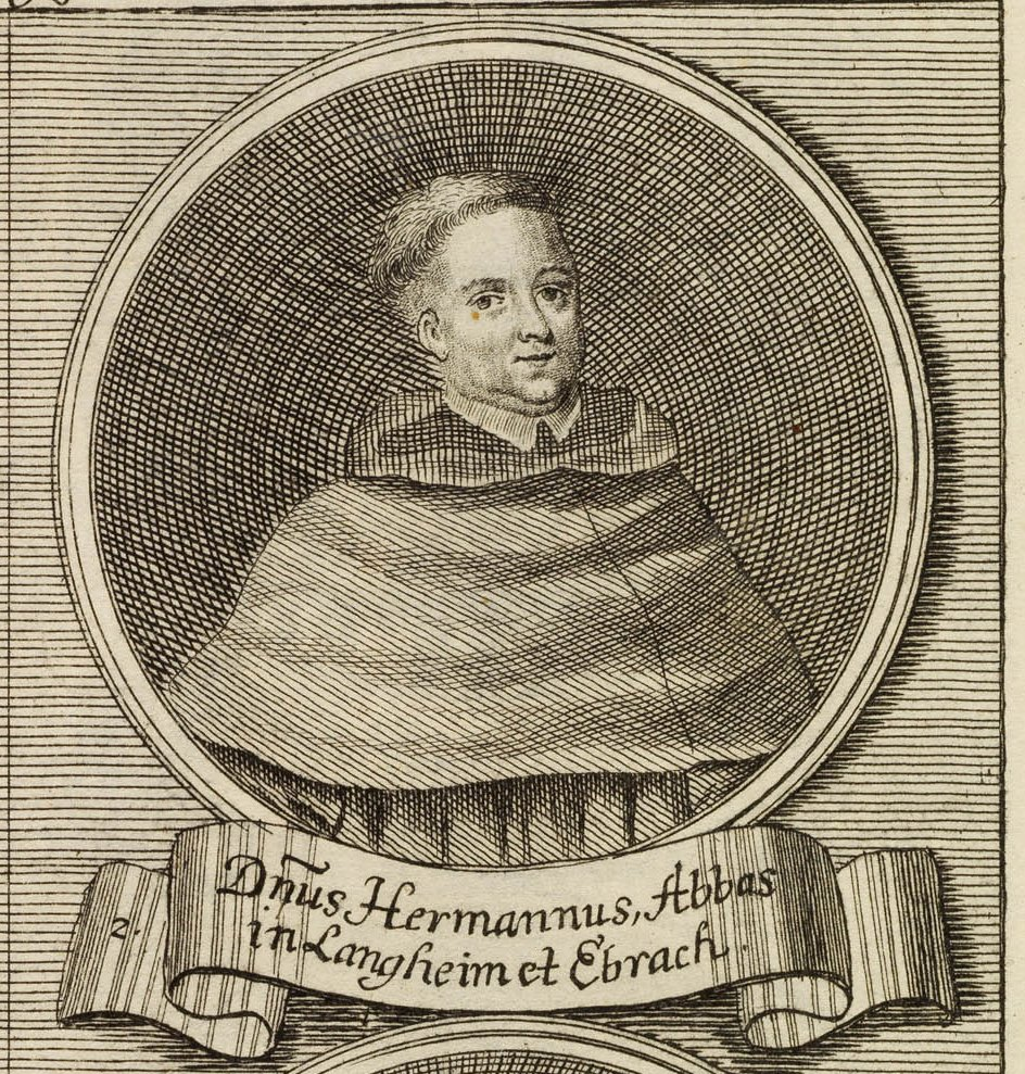 Hermann II., Abt von Kloster Langheim, Abt von Kloster Ebrach, Kupferstich um 1720, Abtei Langheim